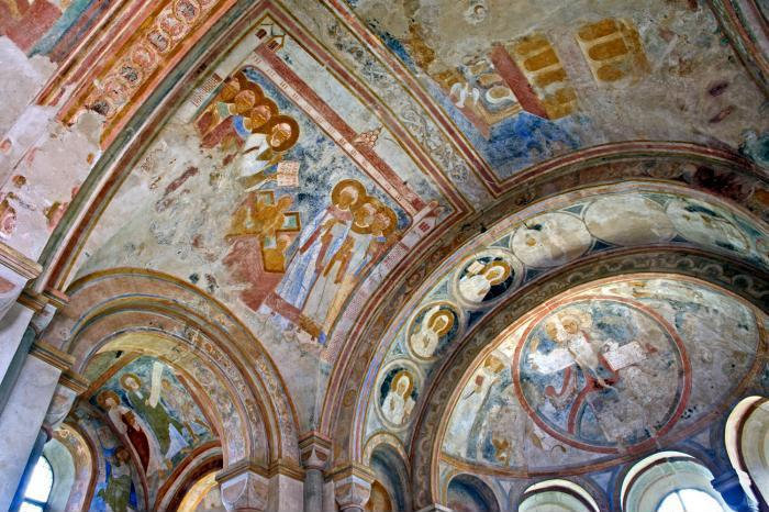 Idensen, Sigwardskirche, Fresken